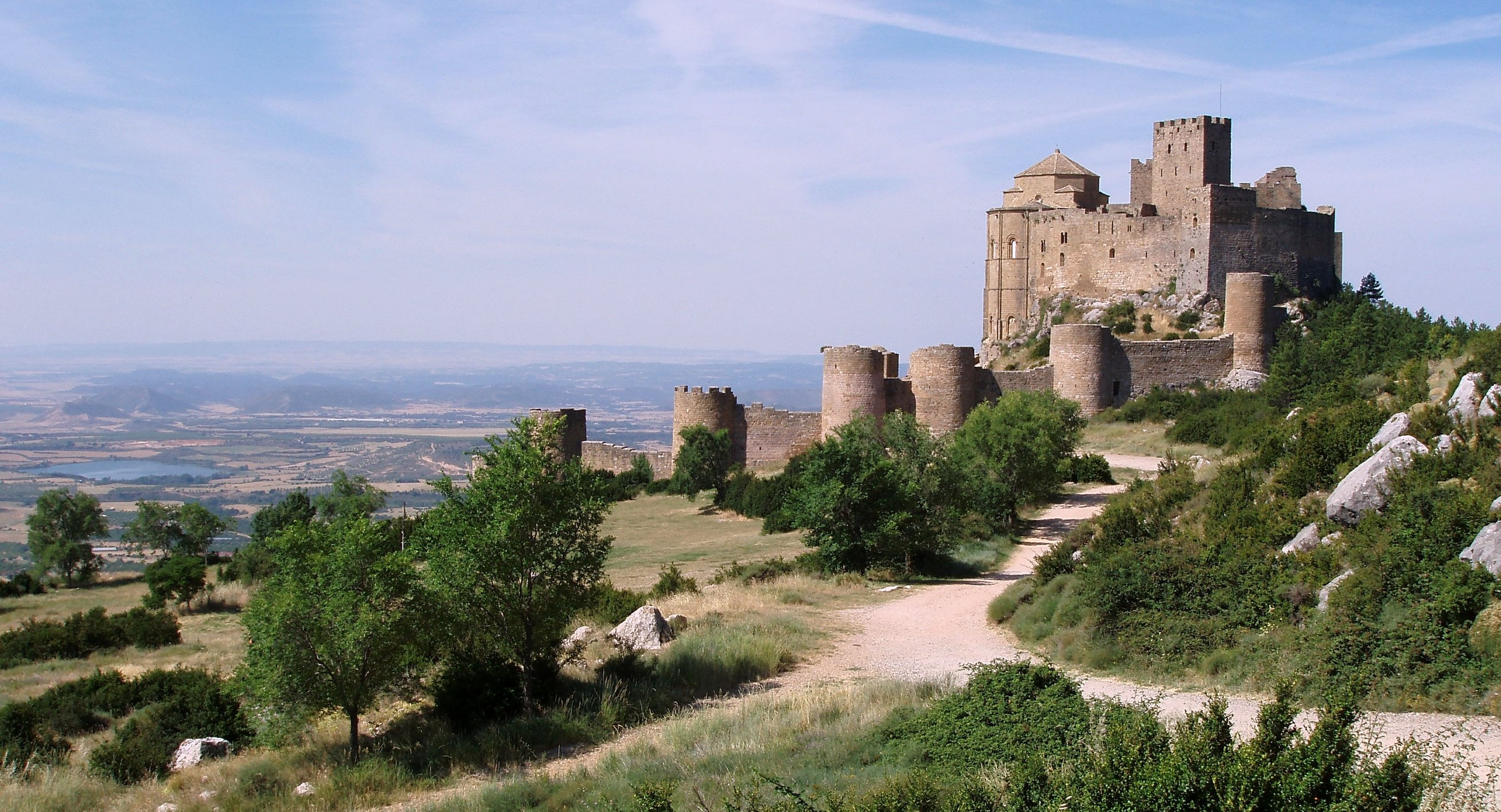 Vista del Castillo de Loarre. Este castillo románico, amurallado con torreones, está en la sierra de Loarre, en la provincia de Huesca (España) (a unos 35 kilómetros de la capital provincial). Fue construido en el siglo XI por orden del rey Sancho III de Navarra sobre un promontorio de roca caliza. Está considerado como la fortaleza románica mejor conservada de Europa.